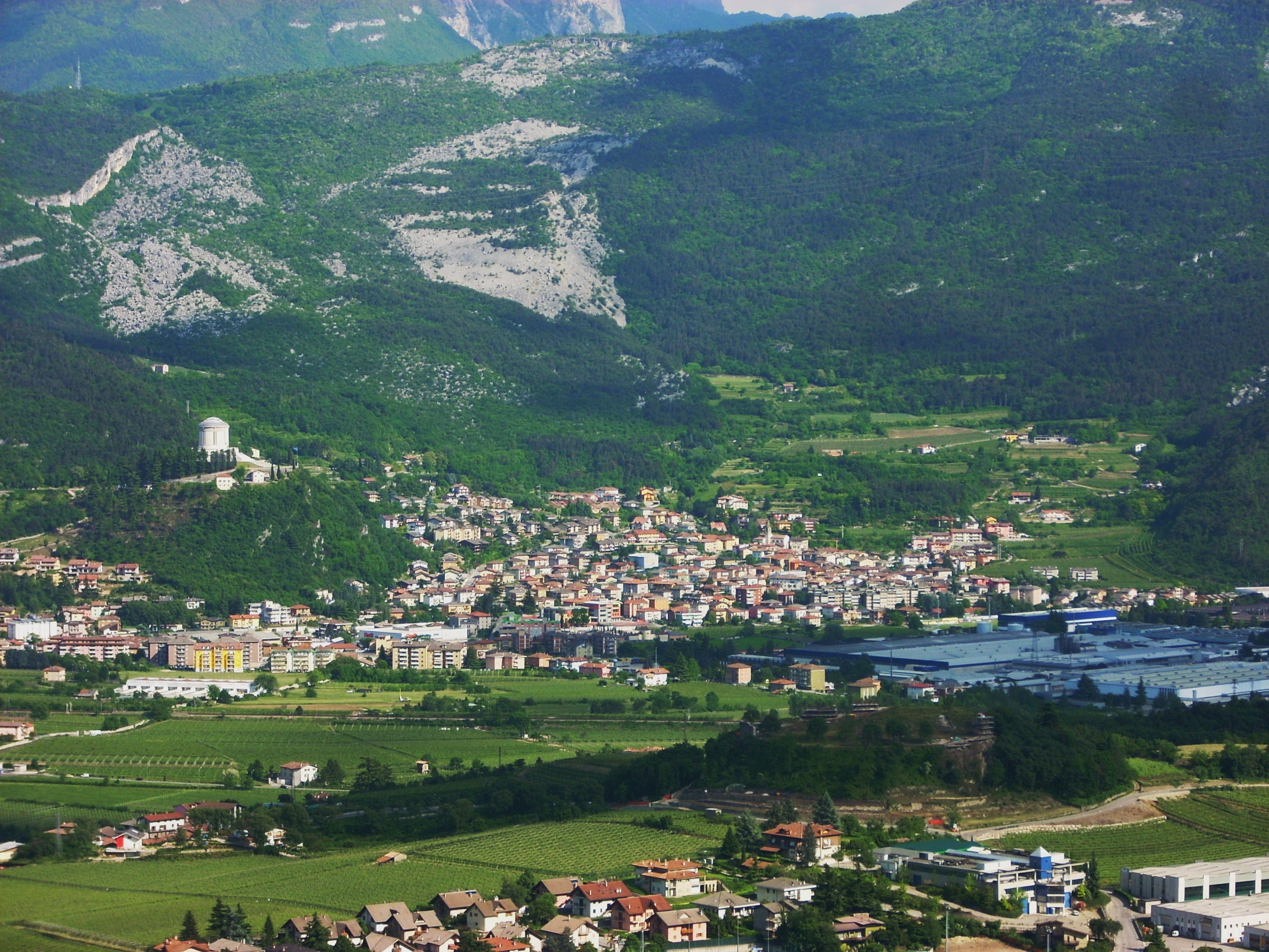 Lizzana, frazione di Rovereto (TN); è distinguibile sulla sinistra l'Ossario di Castel Dante.